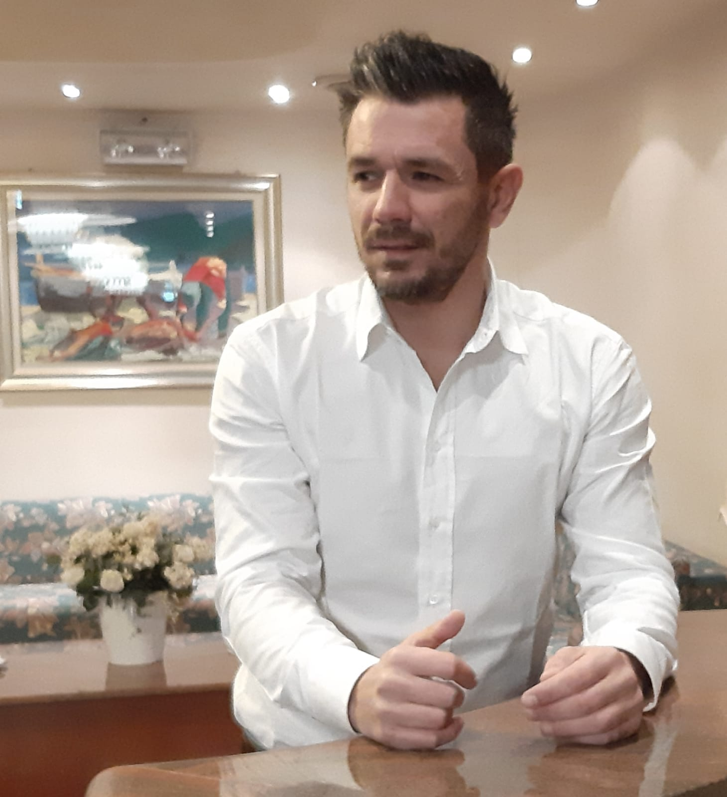 Lo scrittore Roberto Emanuelli